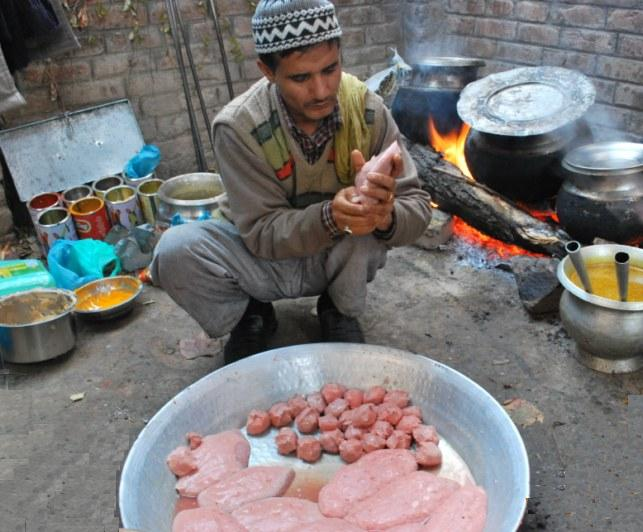 Waza Preparing Rista